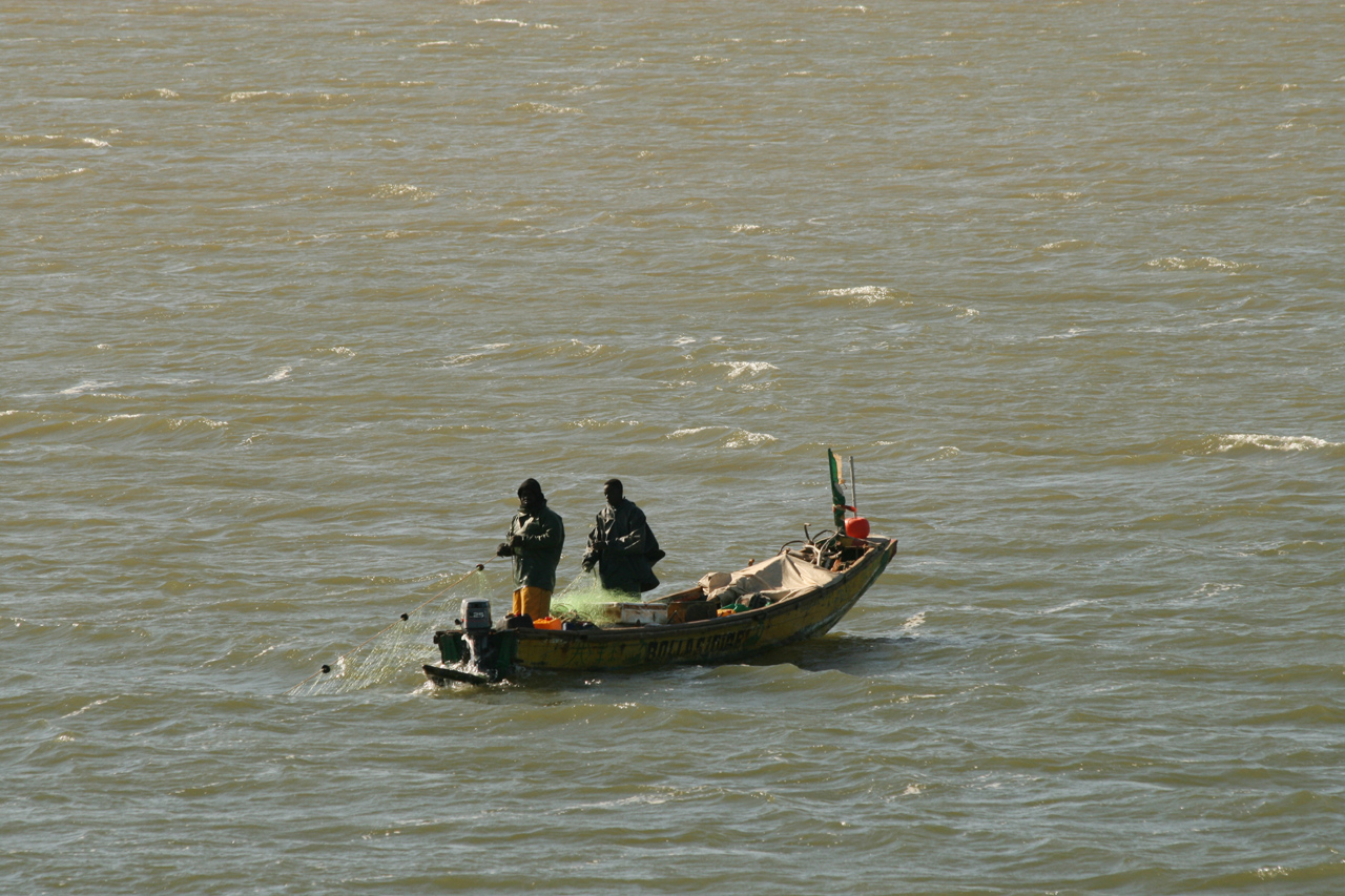 Pecheur sur le fleuve Sénégal